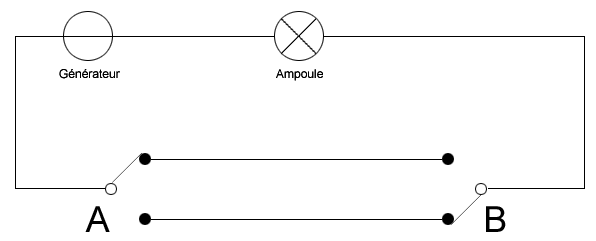 Schéma électrique d'un système de va et vient